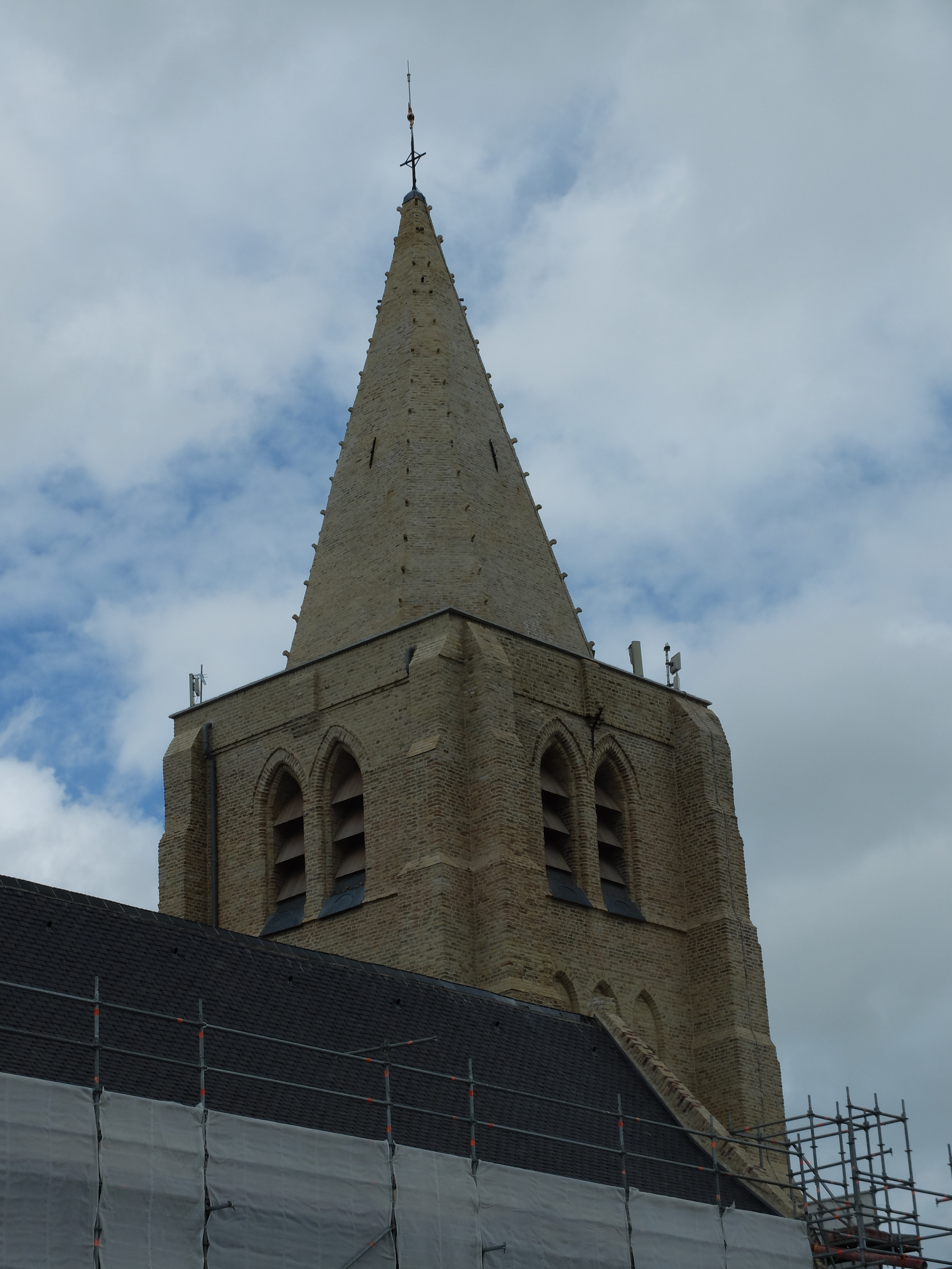 Vue du clocher de l'église Saint-Jean-Baptiste de Buysscheure.